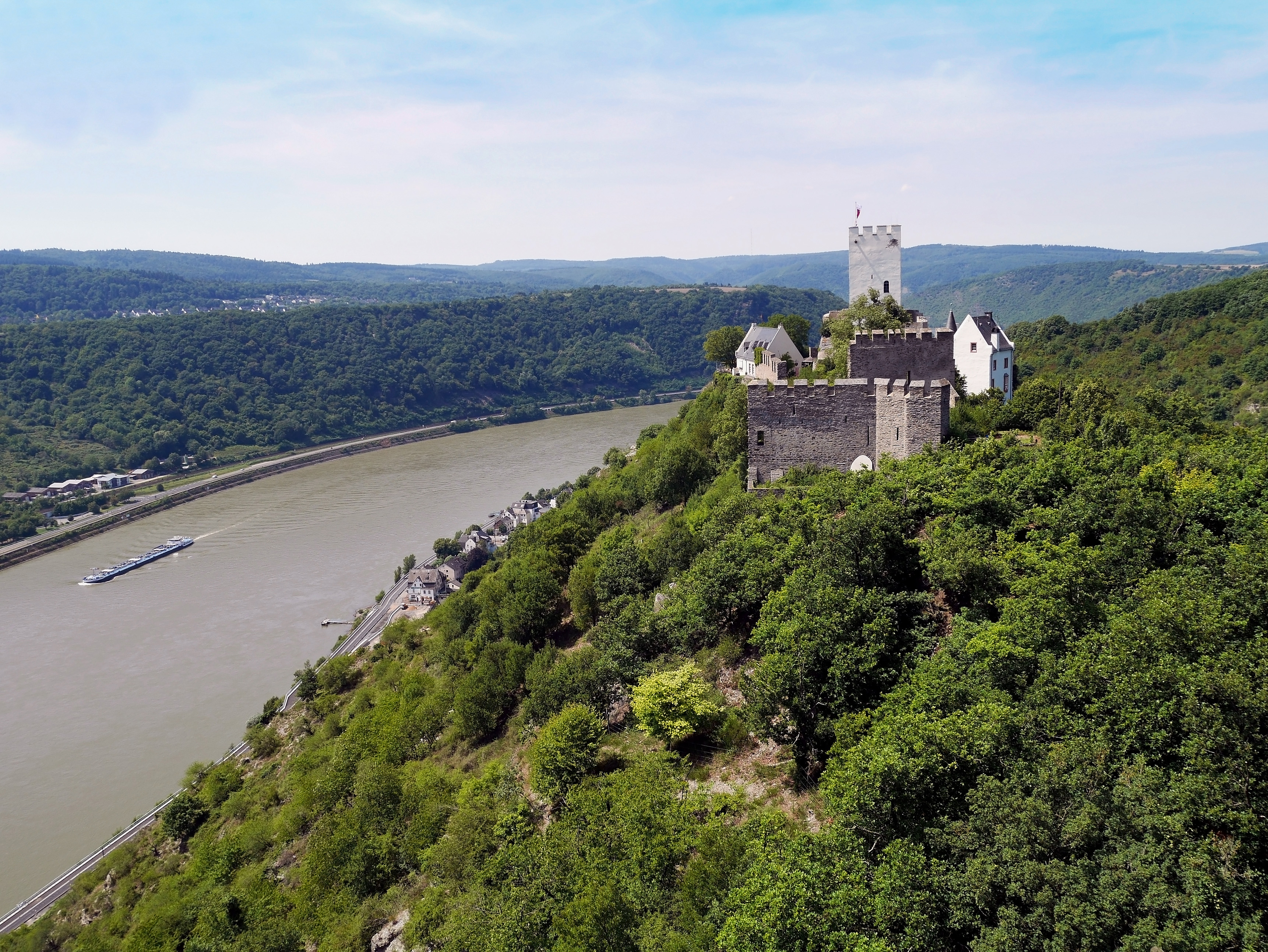 Die Burg Sterrenberg ist eine Ruine auf der rechten Rheinseite, oberhalb von Kamp-Bornhofen. Die Burg wurde bereits 1034 als Reichsburg erwähnt. 1456 wurde die Burg schon baufällig und 1568 als unbewohnt genannt. Sicherungsmaßnahmen und Wiederaufbauten erfolgten von 1970 bis 1977. Zusammen mit der benachbarten Burg Liebenstein bildet sie die so genannten „feindlichen Brüder“.